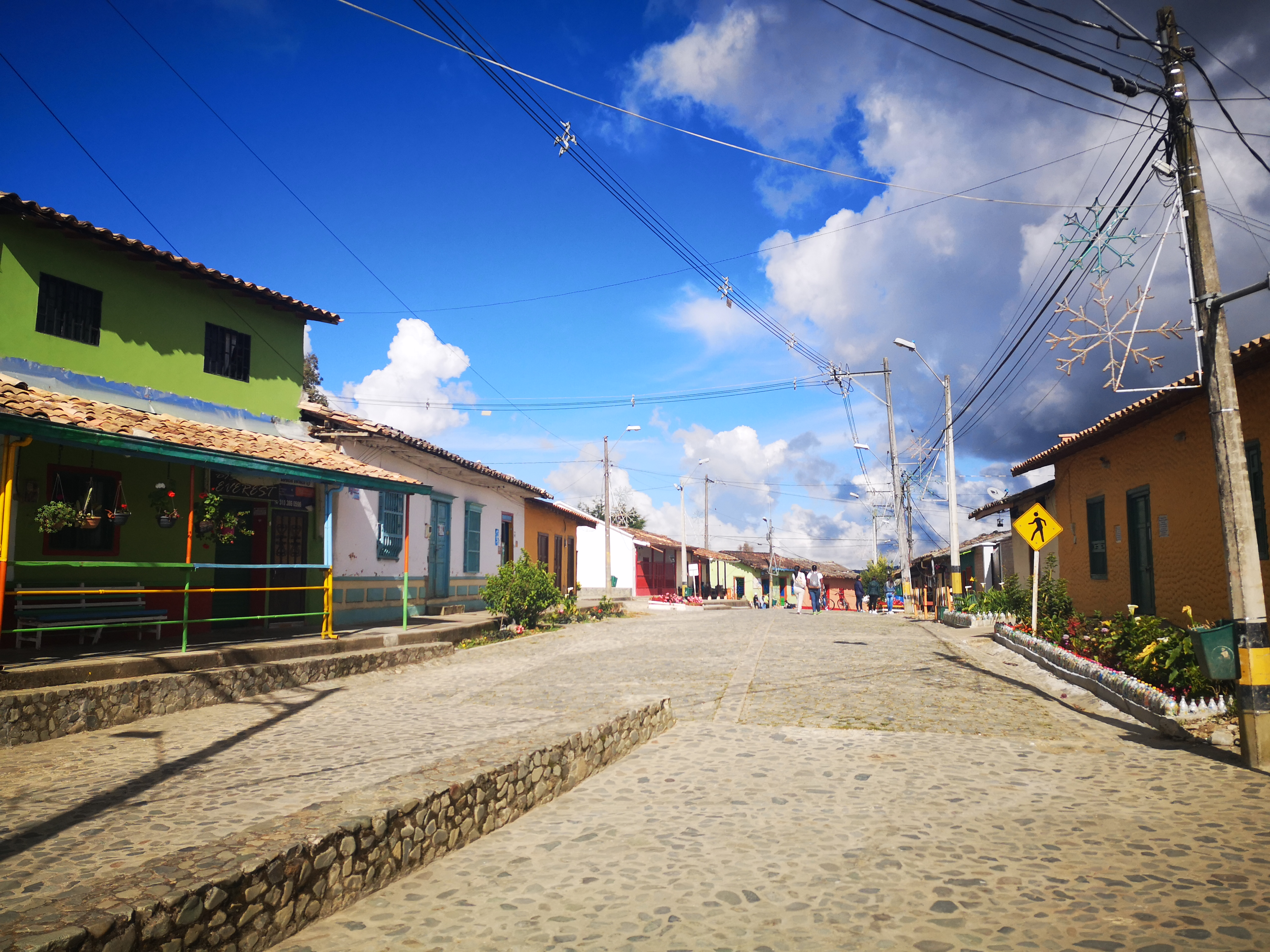 Hoyorrico